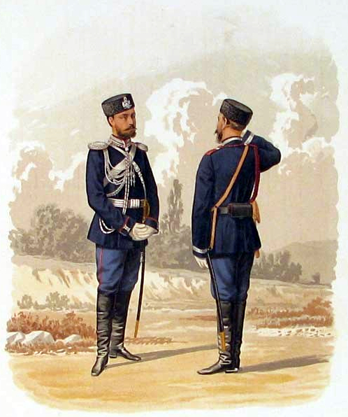 Корпус жандармов. Обер-офицер (в парадной строевой форме) и Унтер-офицер (в парадной и обыкновенной строевой форме) (прик. по воен. вед. 1881 г. № 313).